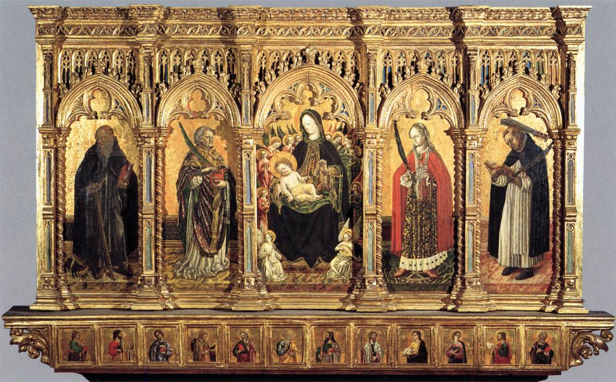 Benedetto Bembo. Madonna and Saints. 1462, Polyptych from the altar of the chapel in the Castello di Torrechiara. Castello Sforzesco, Milan